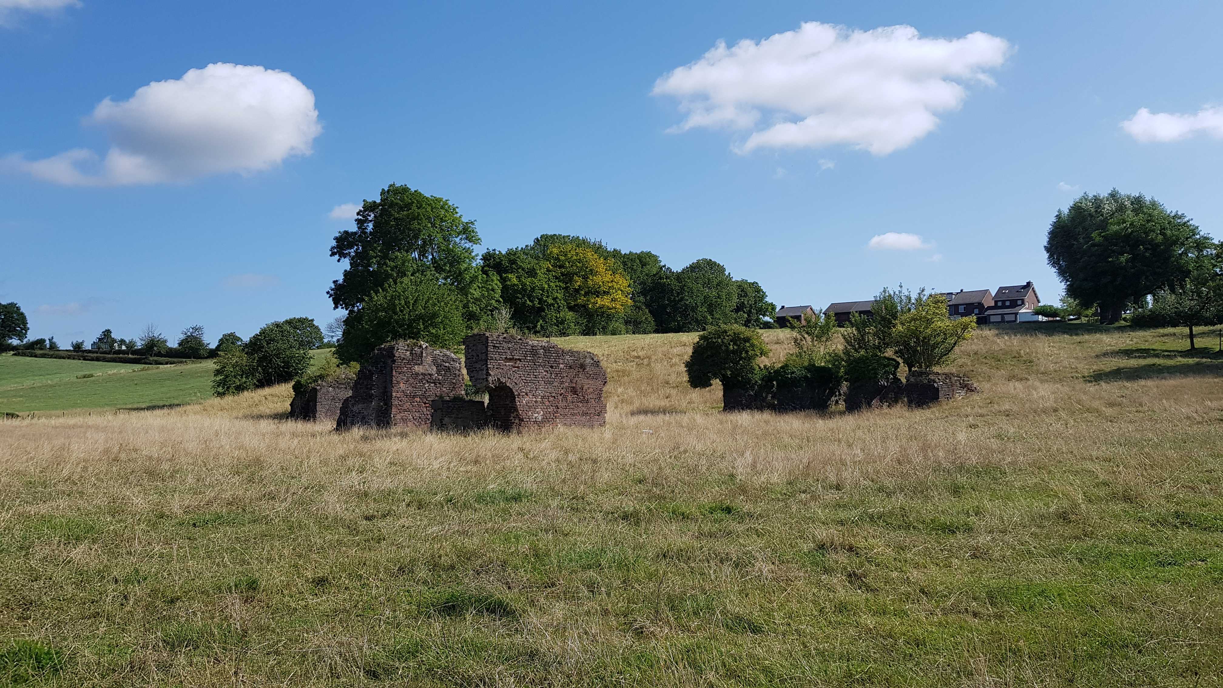 Nederlandsche Portland-Cementfabriek, Vijlen, Nederland